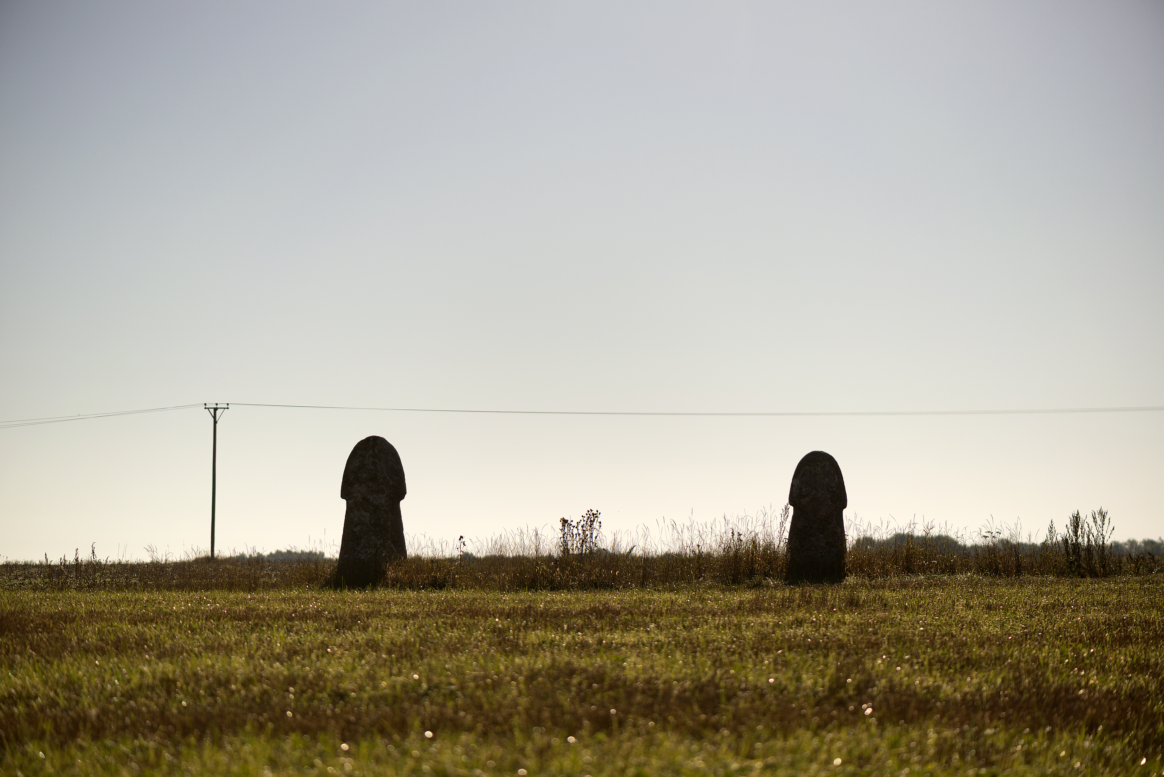 Bro Stajnkällingar